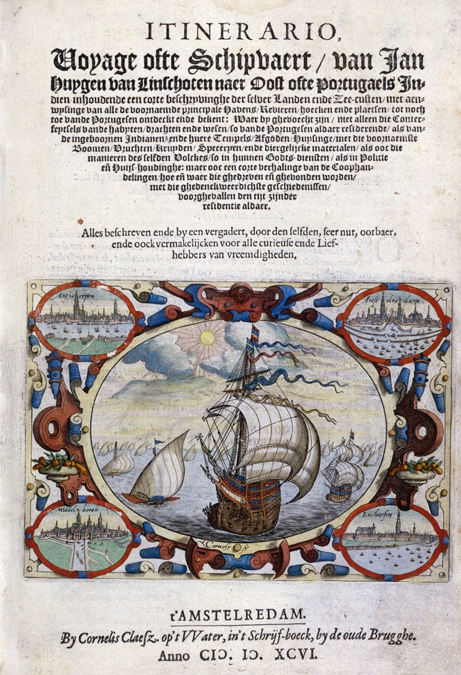 Itirenario, Voyage ofte Schipvaert / van Jan Huygen van Linschoten naar Oost of Portugaels Indien